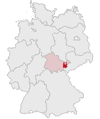 Landkreis Greiz, Thuringia, Germany